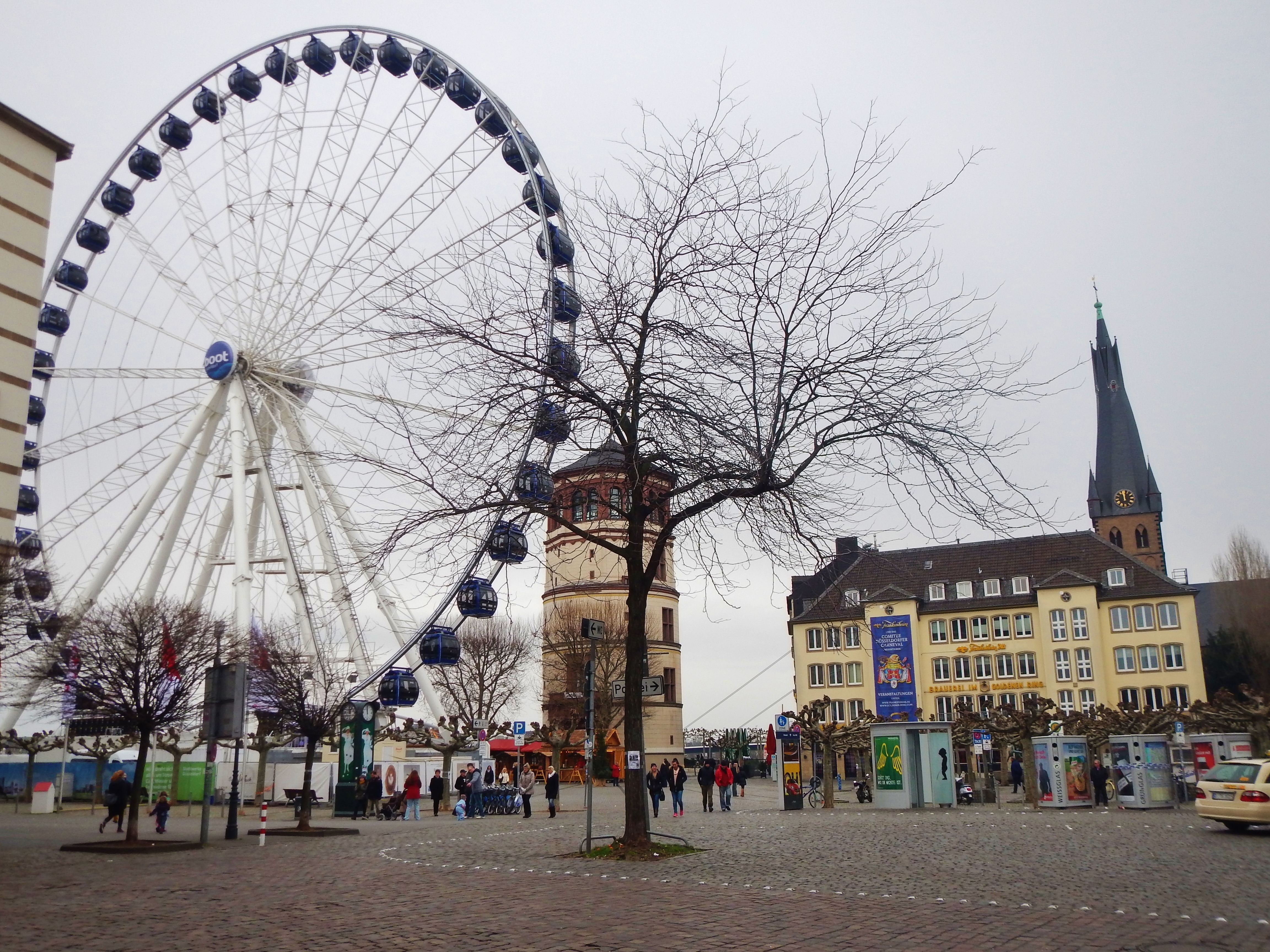 Burgplatz in Düsseldorf